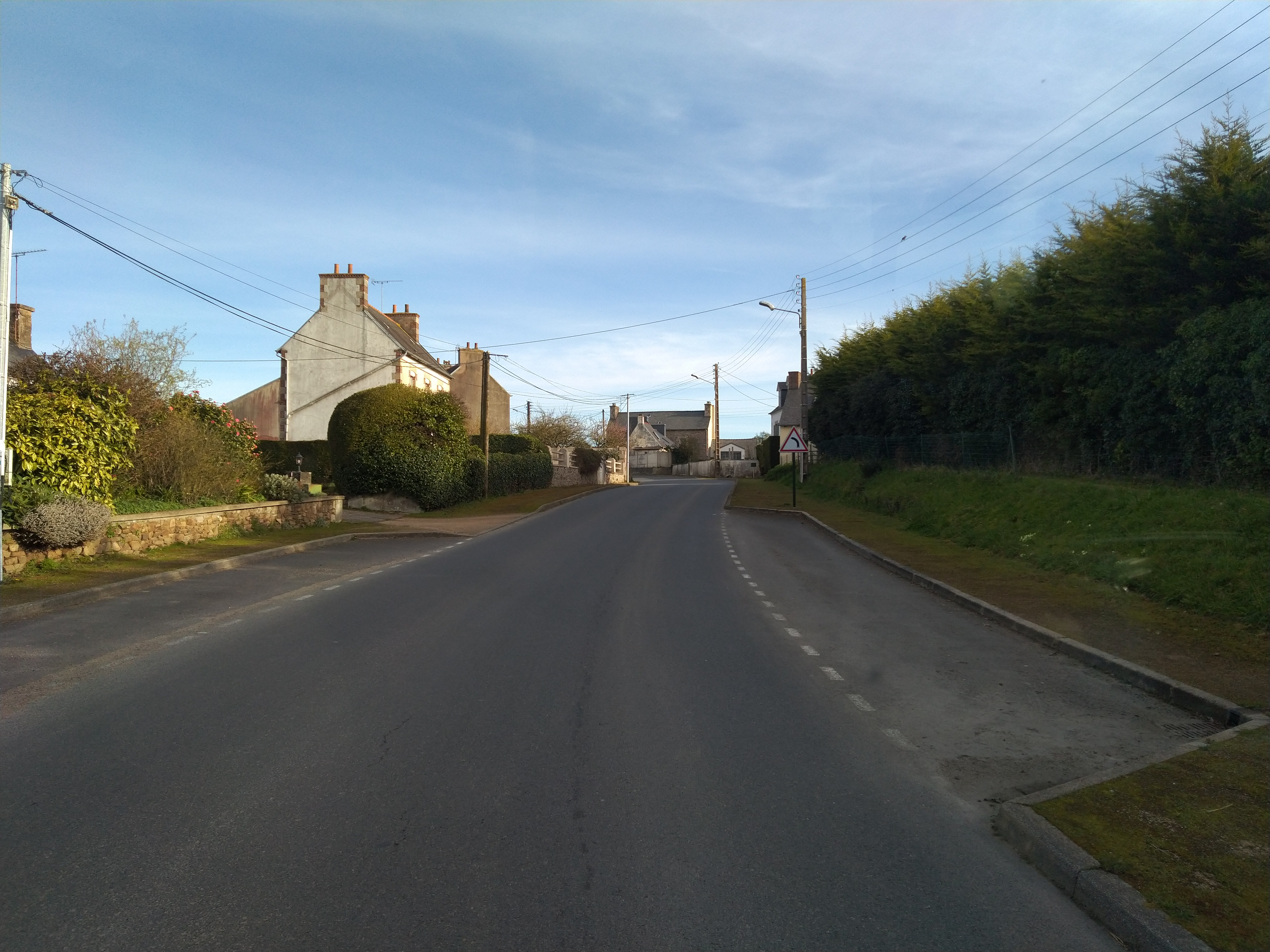 Lanloup - Run ar Vilin